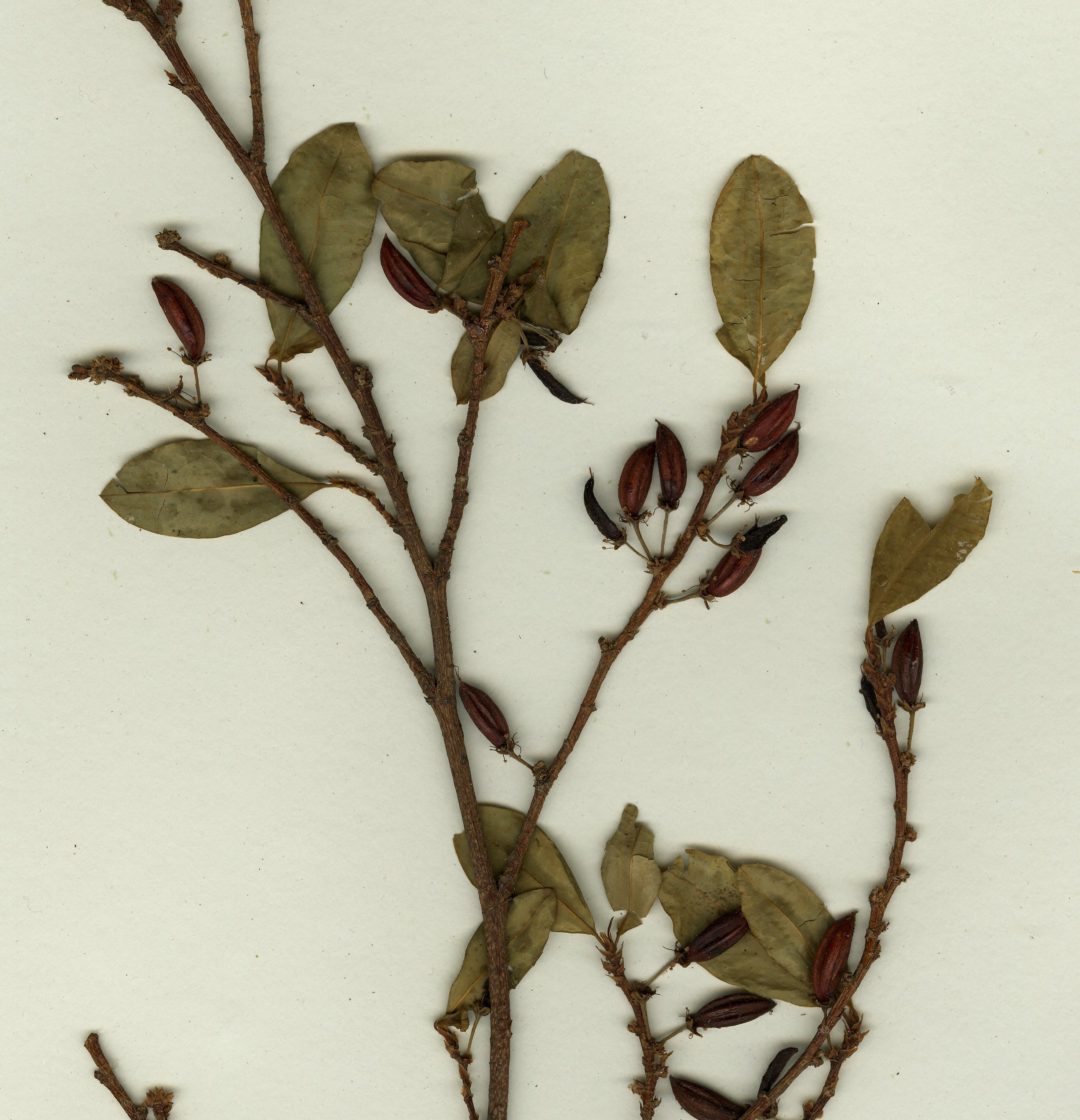 Muestra recogida para el herbario de Missouri Botanical Garden, el 27 de noviembre de 1994 cerca de la ciudad de Cascas en la provincia de Gran Chimú, región La Libertad en Perú.